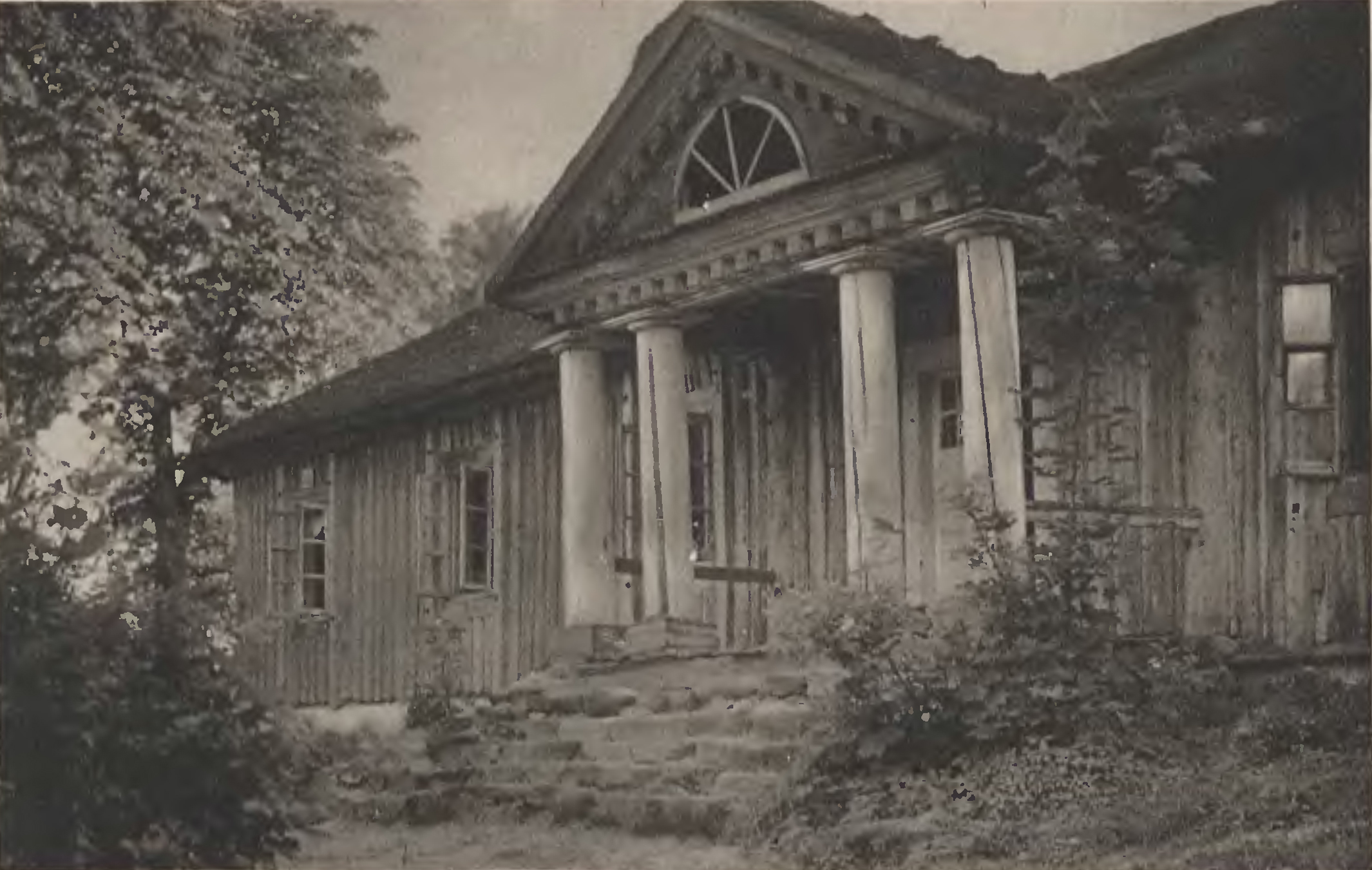 Беларуская (тарашкевіца): Забалацьце (Zabałaćcie), сядзіба Дмахоўскіх (Dmachoŭski)